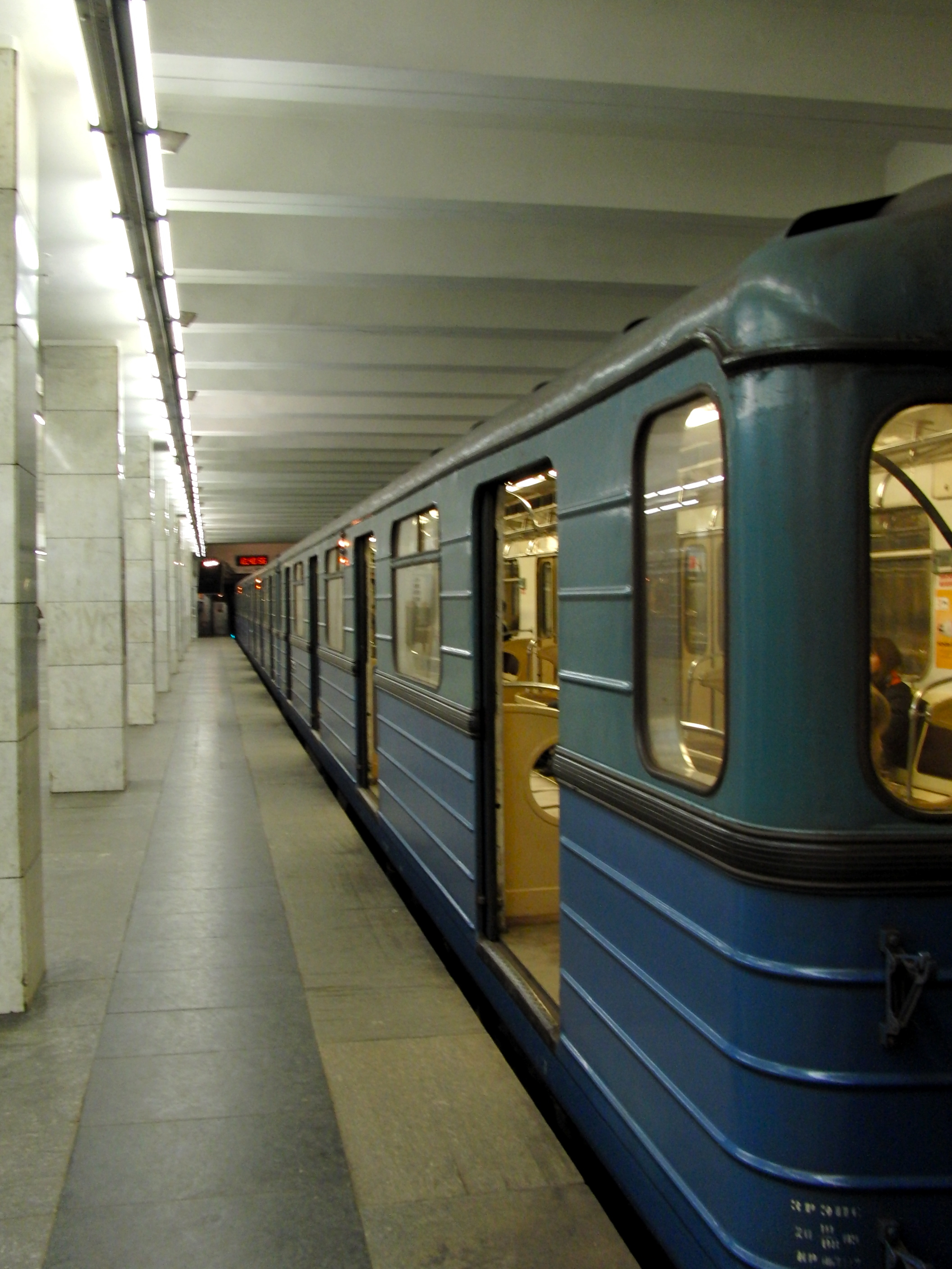 Planernaya (Планерная)